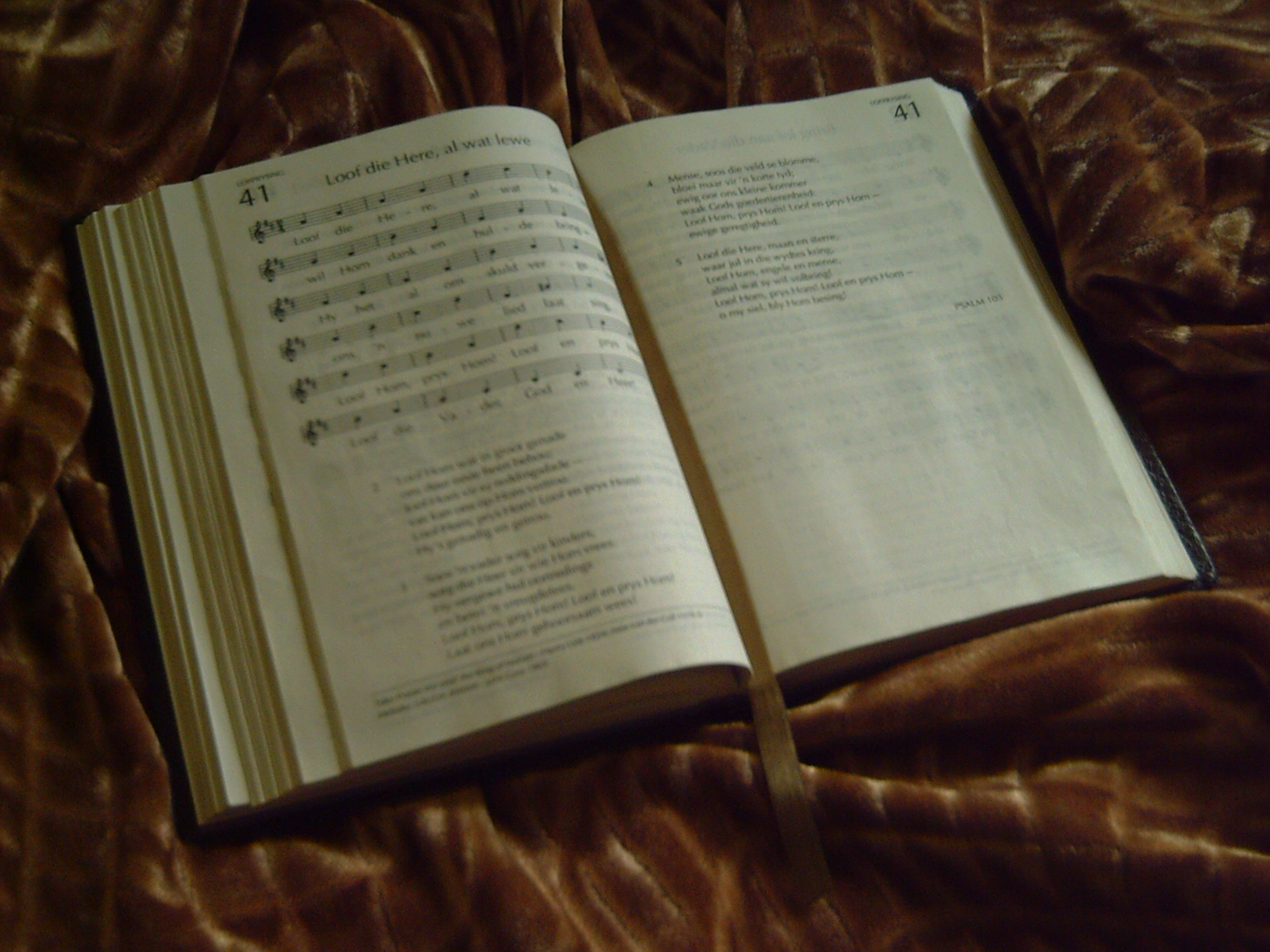 'n Oop Psalm- en Gesangeboek van die Afrikaanse Protestantse Kerk. Die boek is oop by Gesang 41.